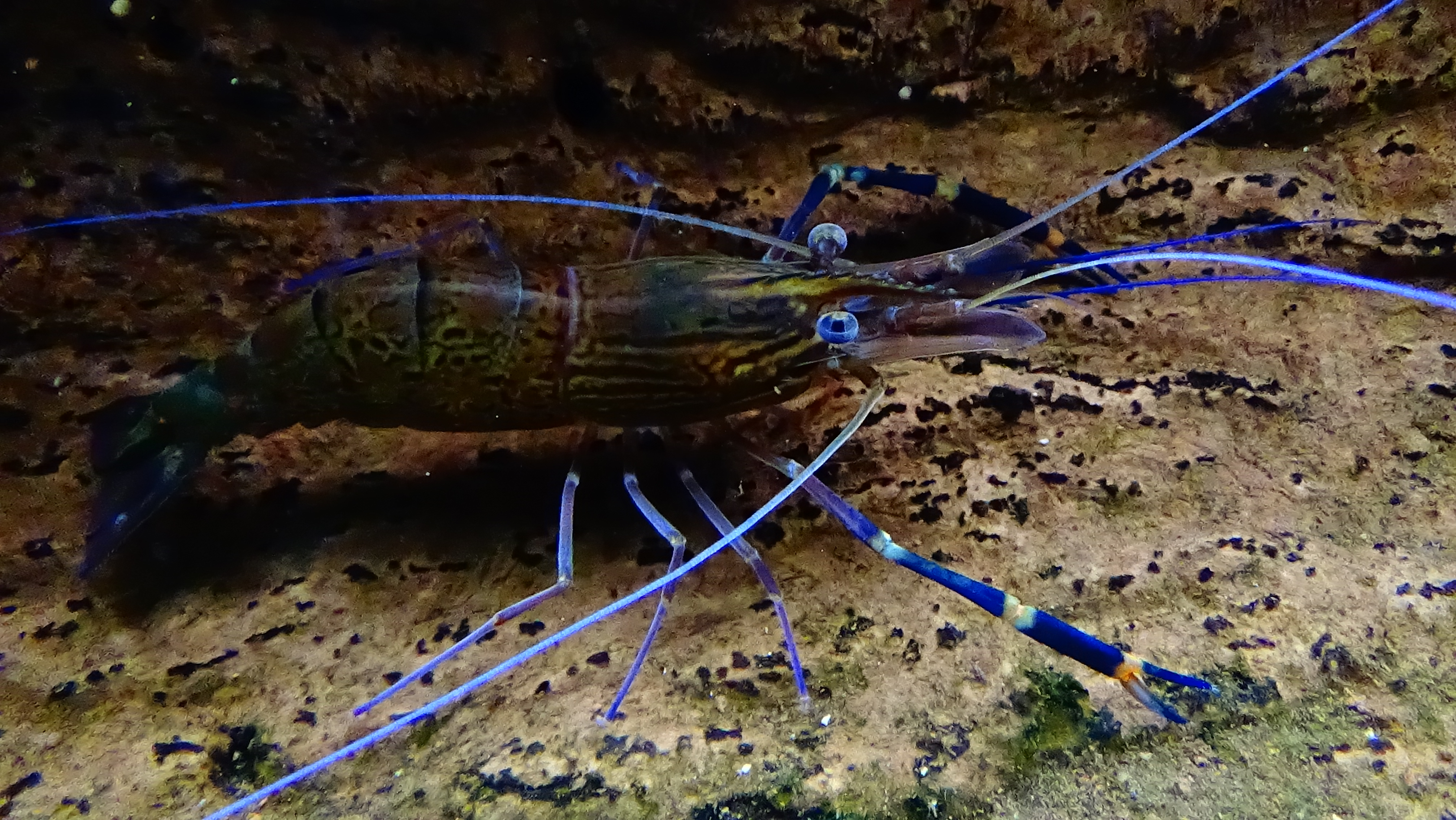 Macrobrachium rosenbergii - crevette géante d'eau douce - Aquarium tropical de la Porte Dorée - 12/2014